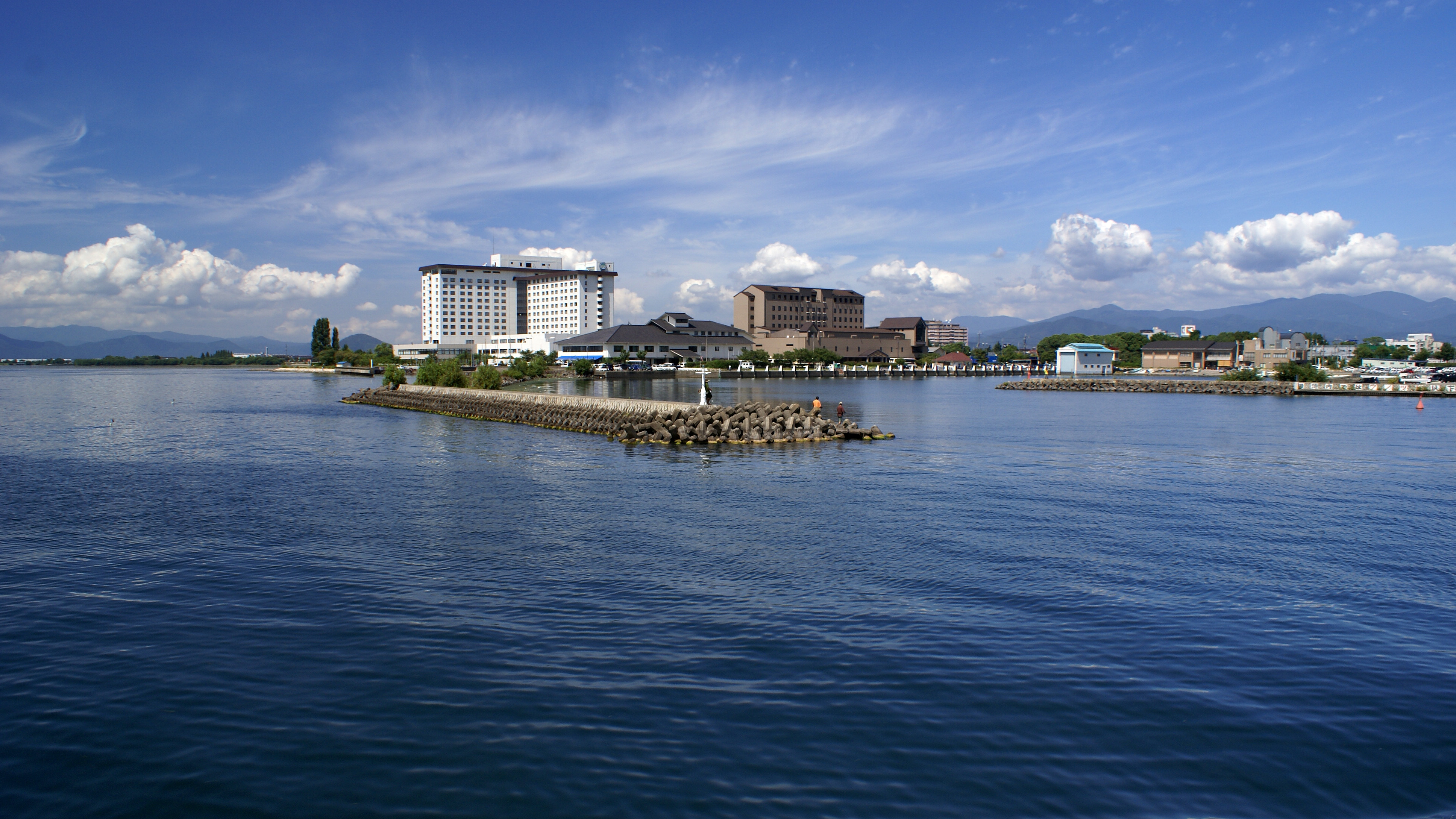 Nagahama port in Nagahama, Shiga prefecture, Japan